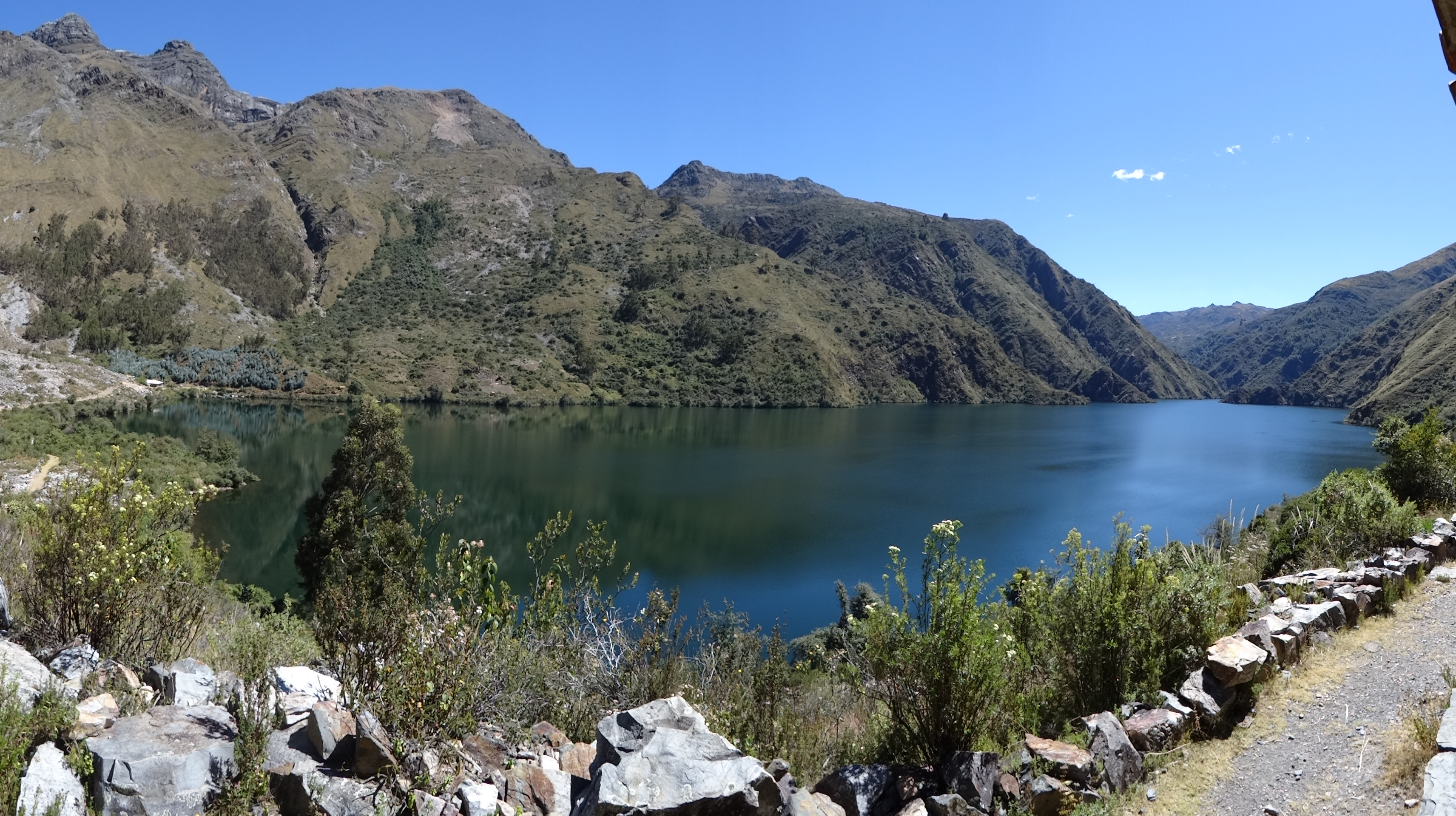 Vista panorámica desde la orilla sureste.